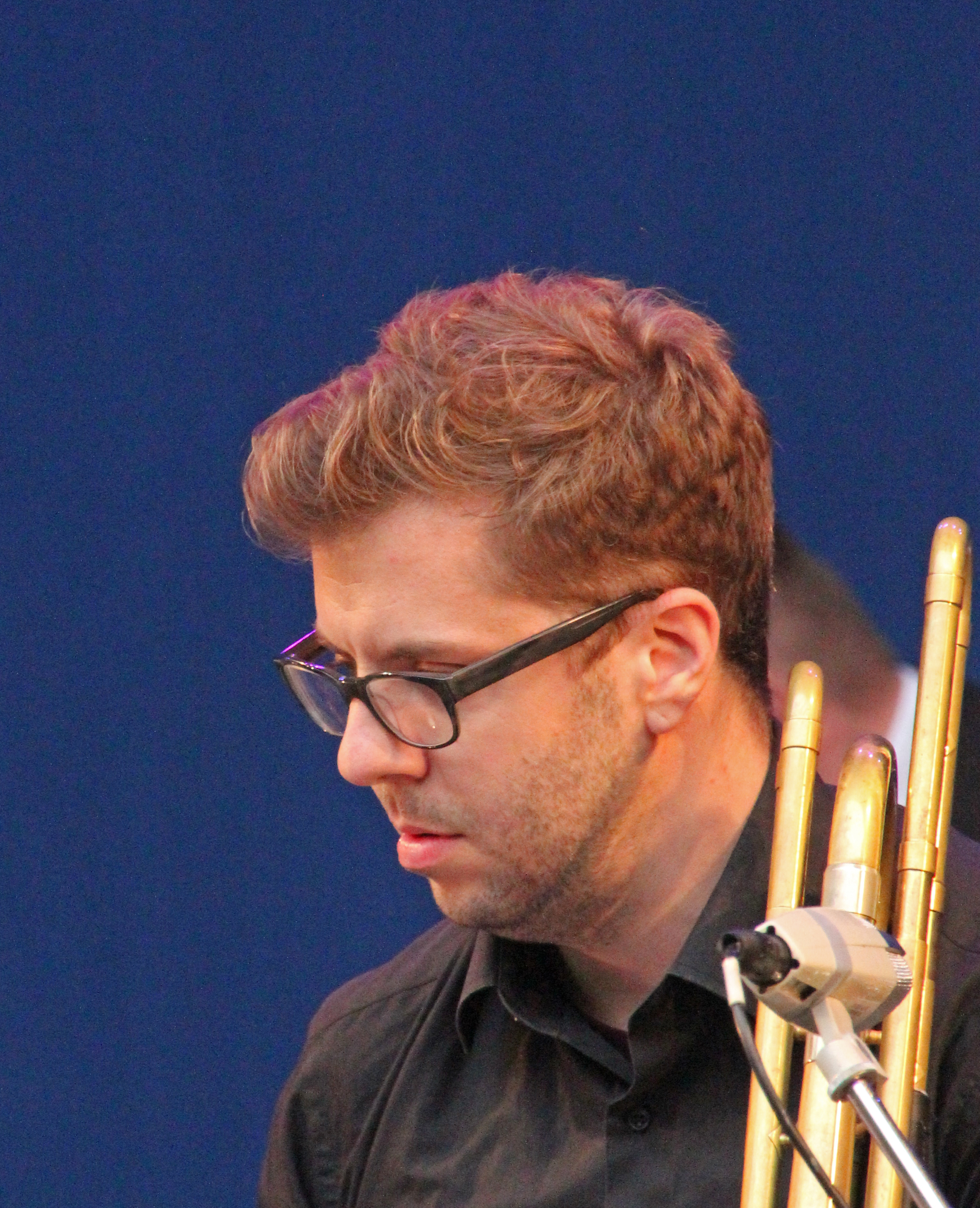 Bildinhalt: Der Jazz-Musiker Jan Schreiner bei einem Auftritt im Palmengarten Aufnahmeort: Frankfurt am Main, Deutschland Die dargestellte Person wurde bei einem öffentlichen Auftritt fotografiert.